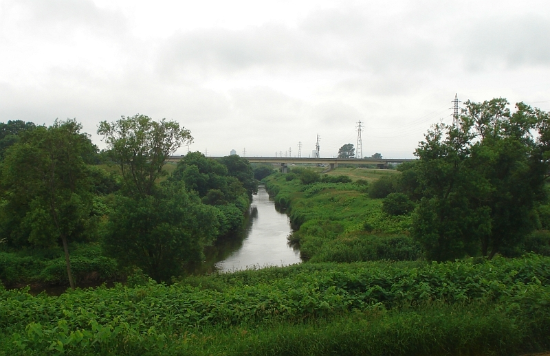 北海道・札幌市南区・清田区・厚別区・白石区・江別市を流れる厚別川。野津幌川との合流地点。